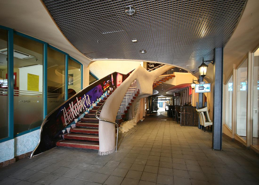 Wnętrze krzywego domku.